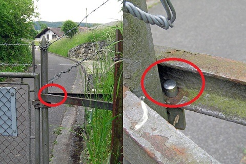 Geocache im Kanton Aargau, Schweiz